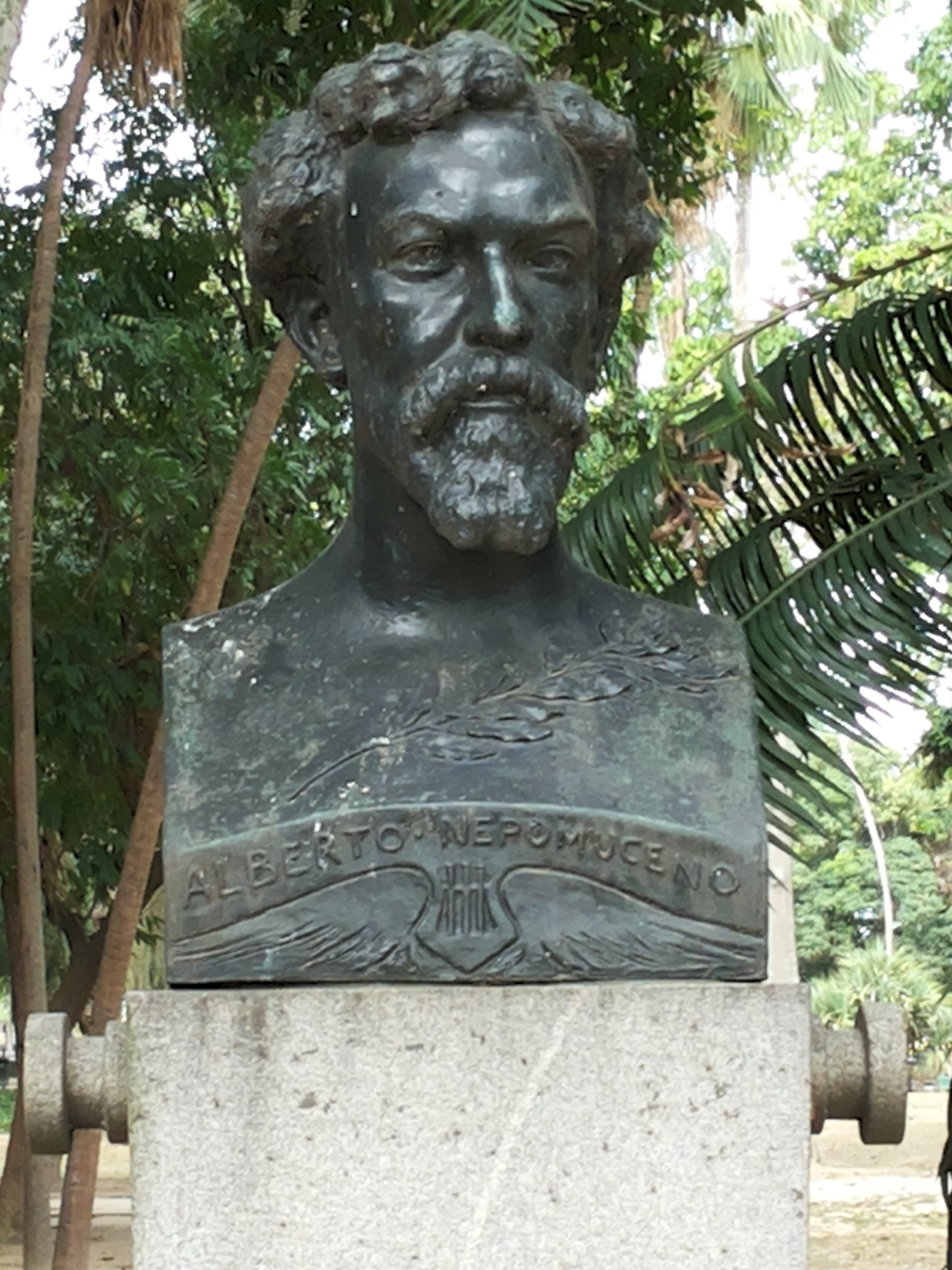 Busto Alberto Nepomuceno